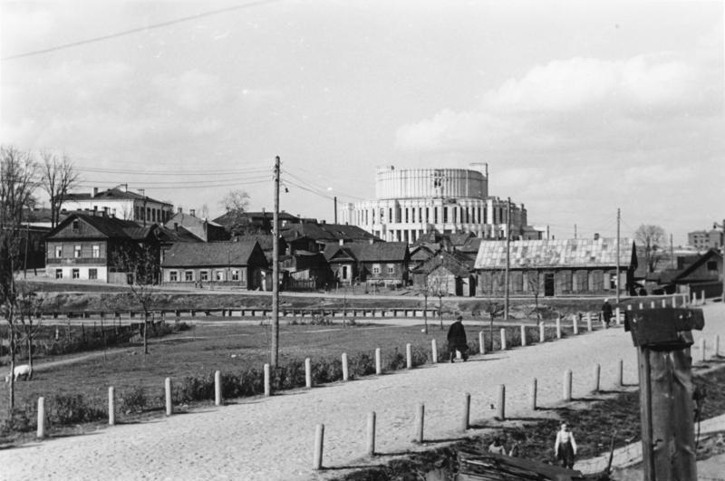 Minsk, Mai 1943 Die Oper von Minsk, ein "Prachtbau" umgeben von lauter kleinen Holzhäusern und Wohnkaten. Film- und Bild-Nr.: F.R. 10/8